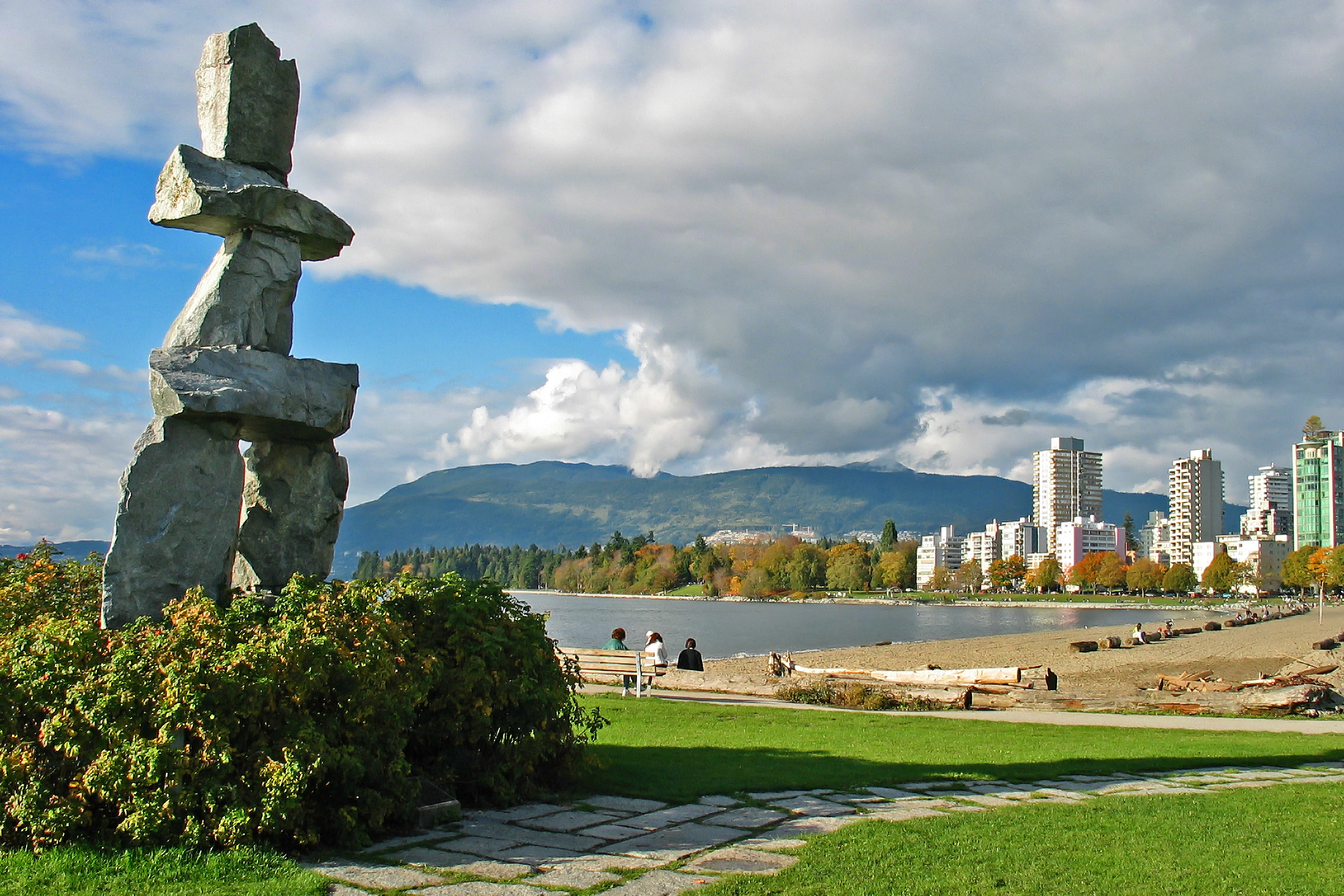 An Inukshuk at English Bay, Vancouver